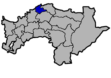 KaurJmeb為編輯臺灣省嘉義縣溪口鄉，於2005年2月10日所繪。